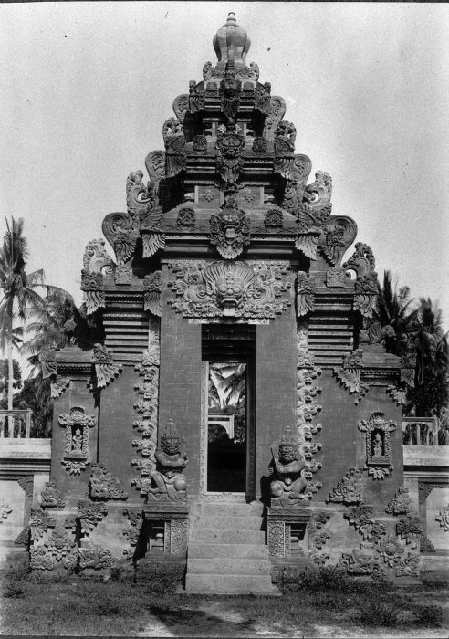 Foto. Bali-museum, Den Pasar.